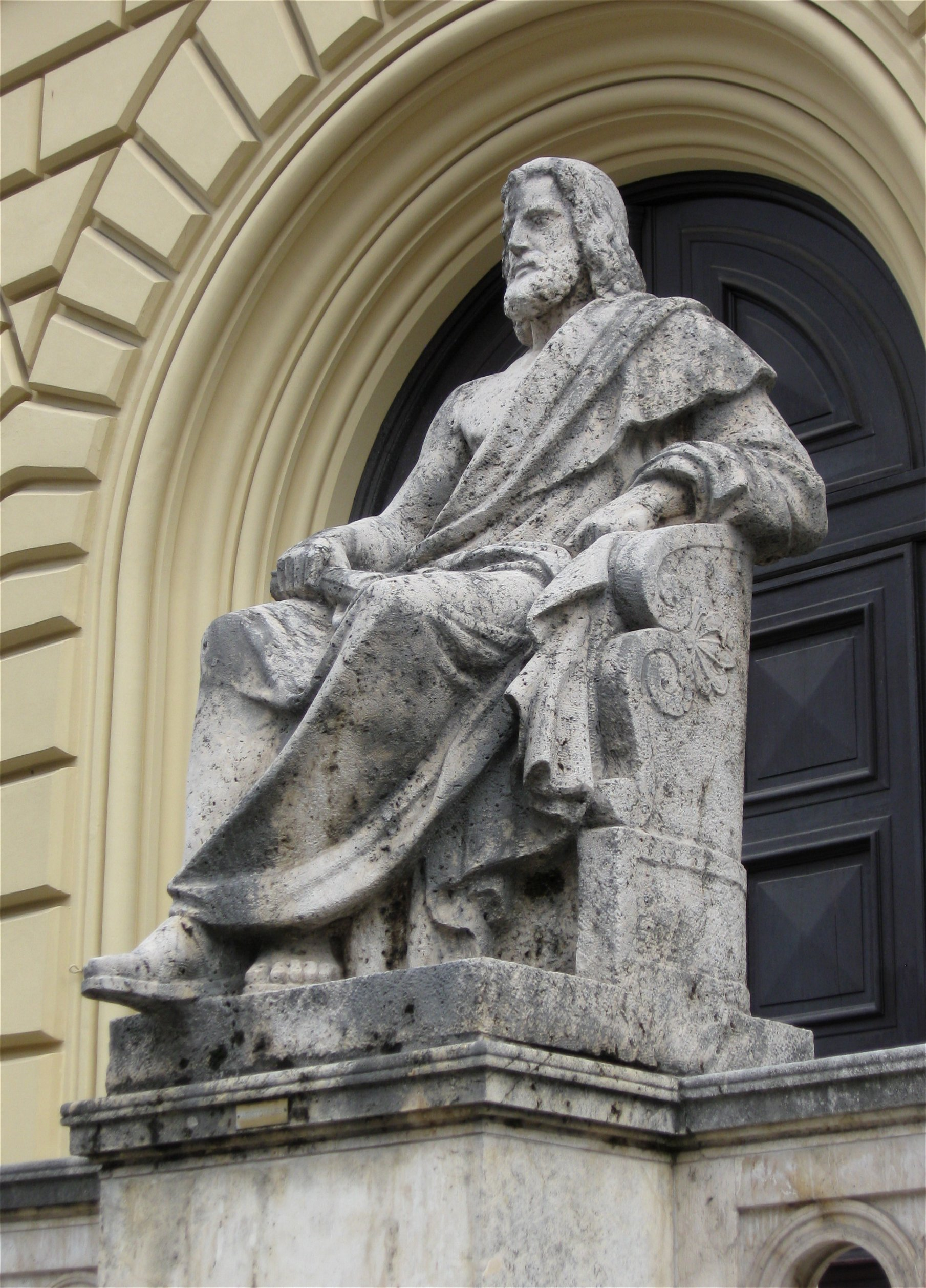 München, Ludwigstraße 16; Bayerische Staatsbibliothek, 1832–39 von Friedrich von Gärtner; Aristotel-Denkmal vor dem Eingangsportal, Kopie von Roland von Bohr (nach dem 2.Weltkrieg); Das Original von Francesco Sanguinetti (Entwurf: Ludwig Michael Schwanthaler) befindet sich seit 1964 auf dem Schulpark der Grundschule in Bernau am Chiemsee (Denkmal D-1-87-118-44).